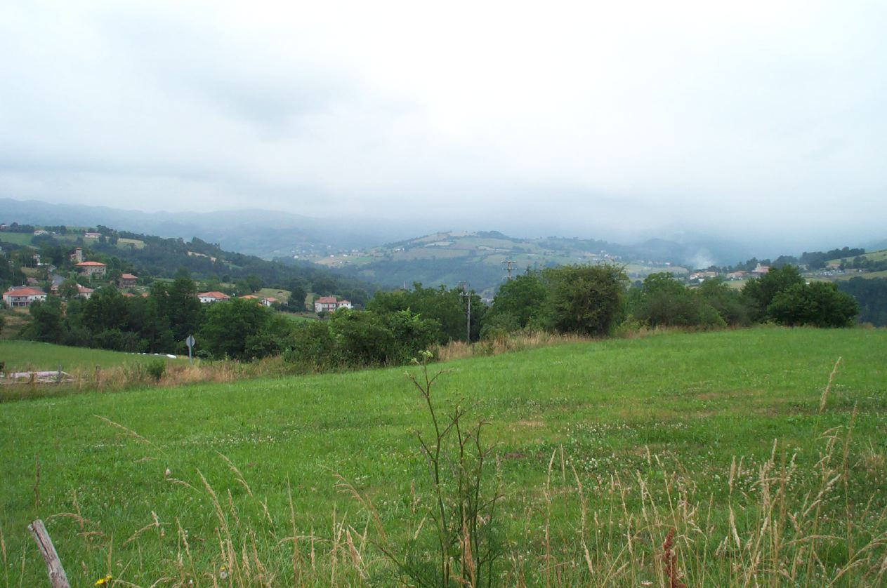 Carranza, Vizcaya, Spain